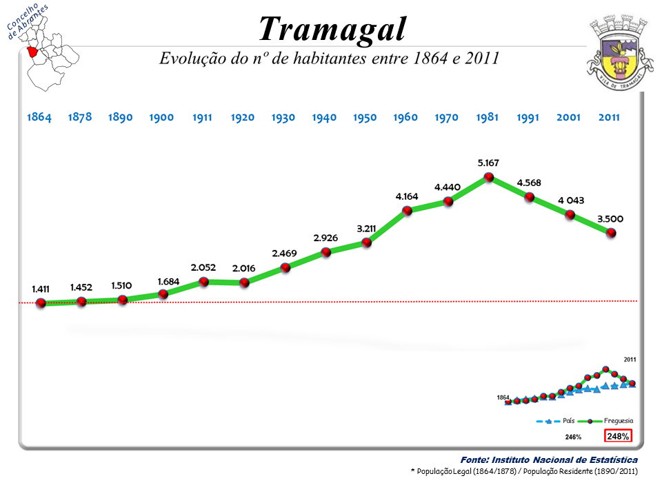 Censos 1864/2011